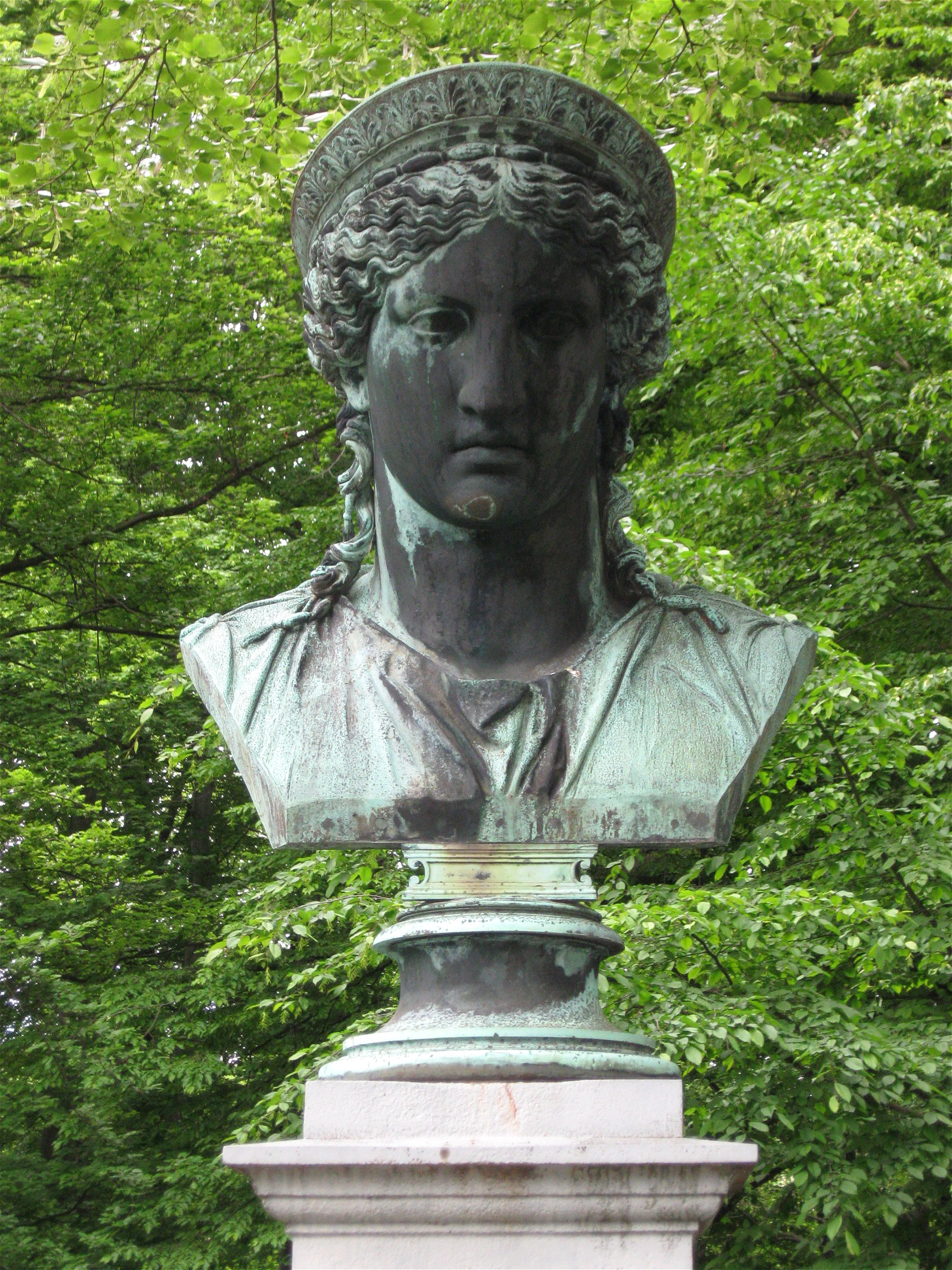 Juno Ludovisi im Schlosspark Pillnitz, Dresden